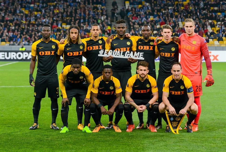 Startaufstellung des BSC Young Boys beim Europa-League-Auswärtsspiel gegen Dynamo Kiew